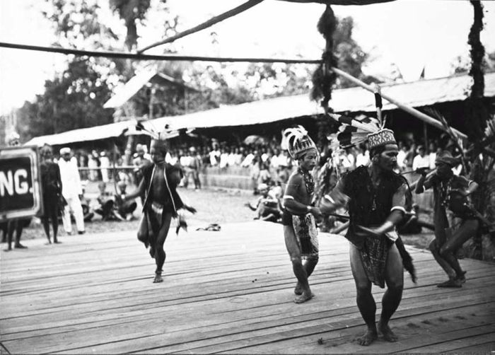 Foto. Dans door een groep Moealang Dajak mannen tijdens het bezoek van Gouverneur-Generaal J.P. Graaf van Limburg Stirum aan Borneo